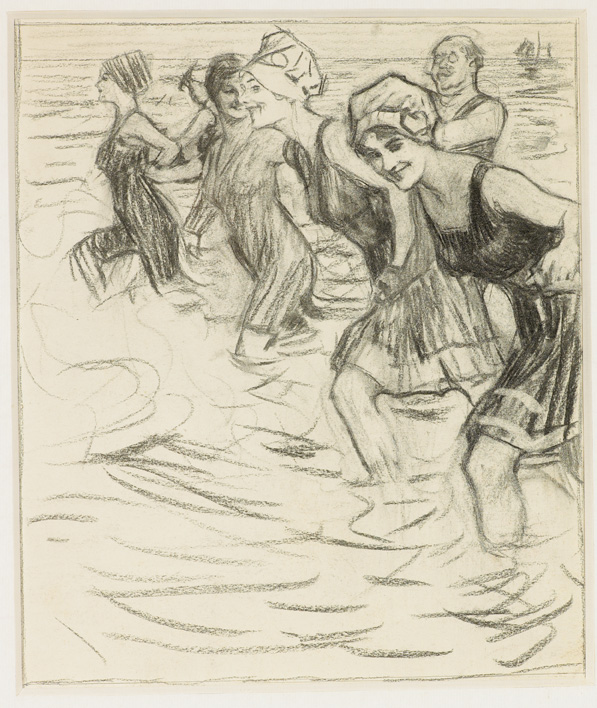 Vorzeichnung zur Bade-Nummer/Simplicissimustitle QS:P1476,de:"Vorzeichnung zur Bade-Nummer/Simplicissimus" label QS:Lde,"Vorzeichnung zur Bade-Nummer/Simplicissimus"